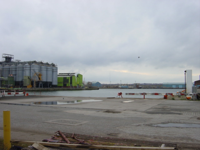 Brocklebank Dock, Bootle